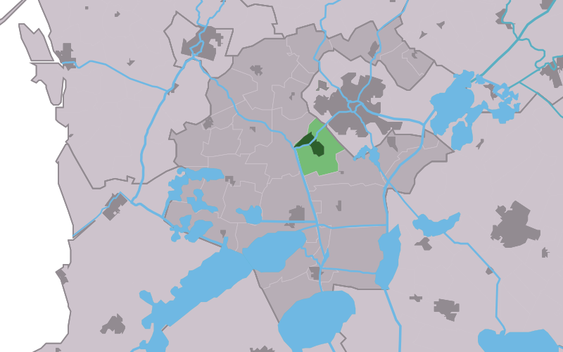 Kaartsje fan himrik fan Drylts